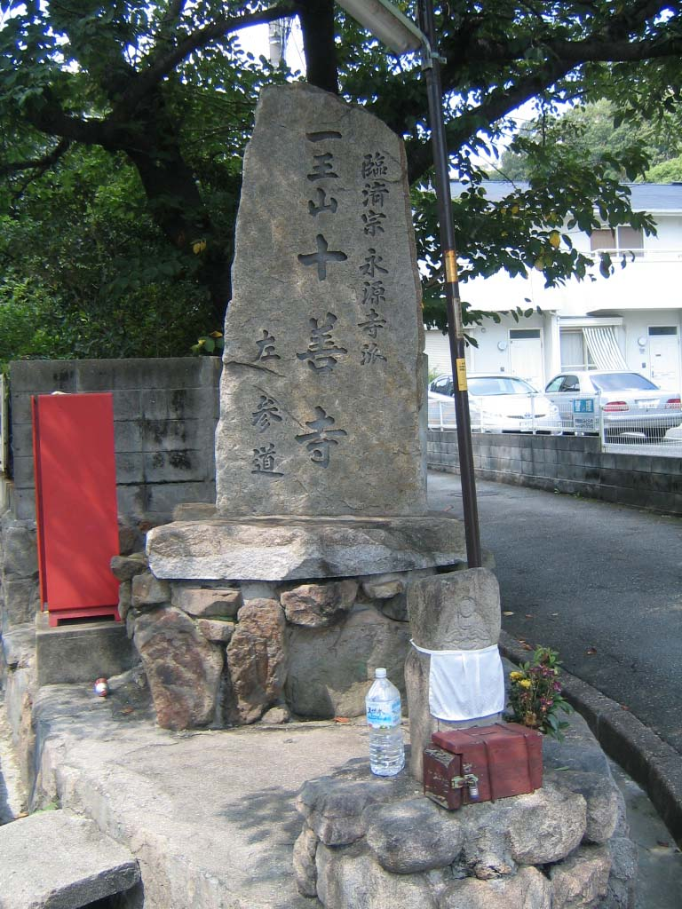 一王山十善寺案内碑(神戸市灘区)